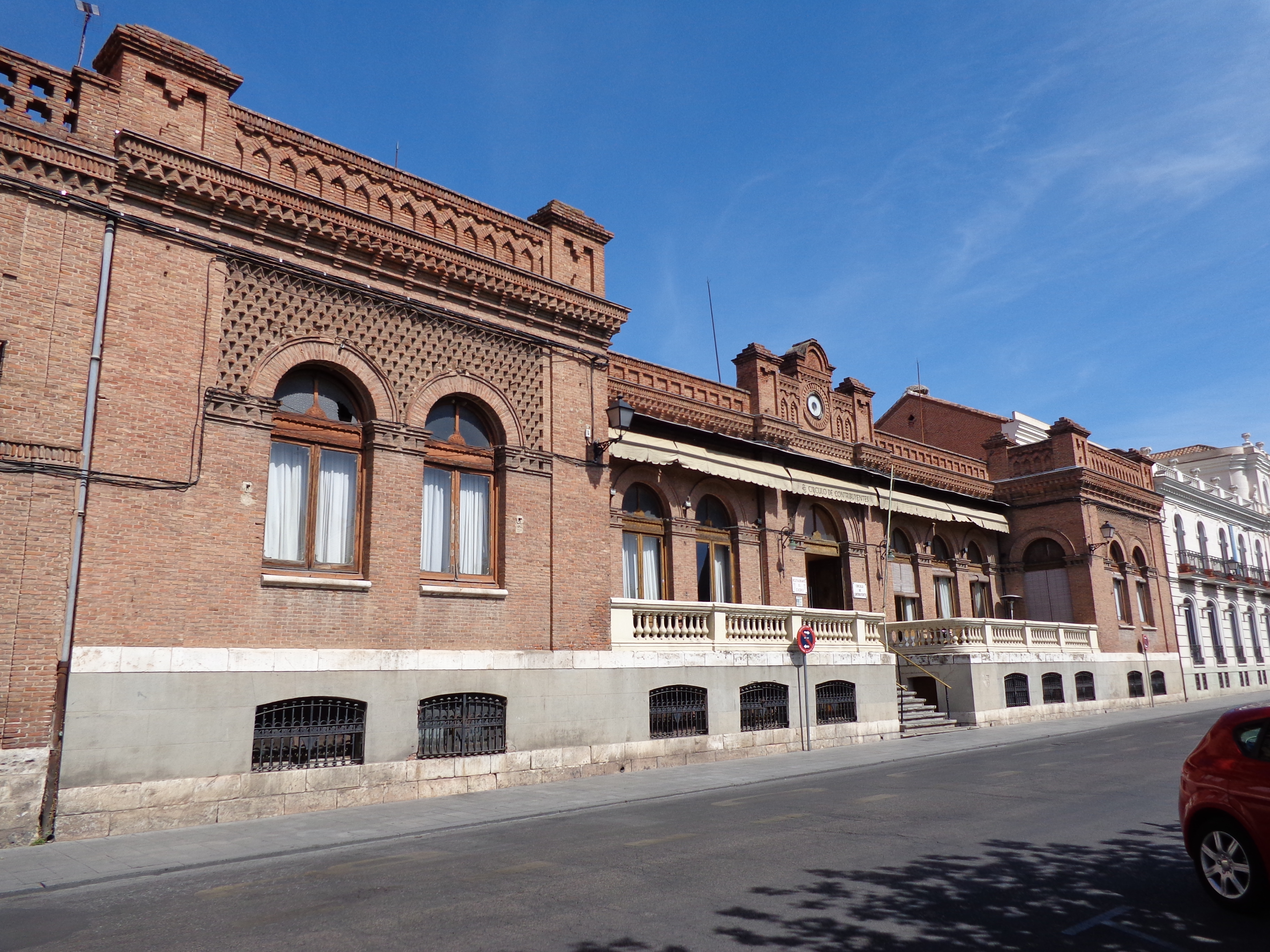 Círculo de Contribuyentes, Alcalá de Henares